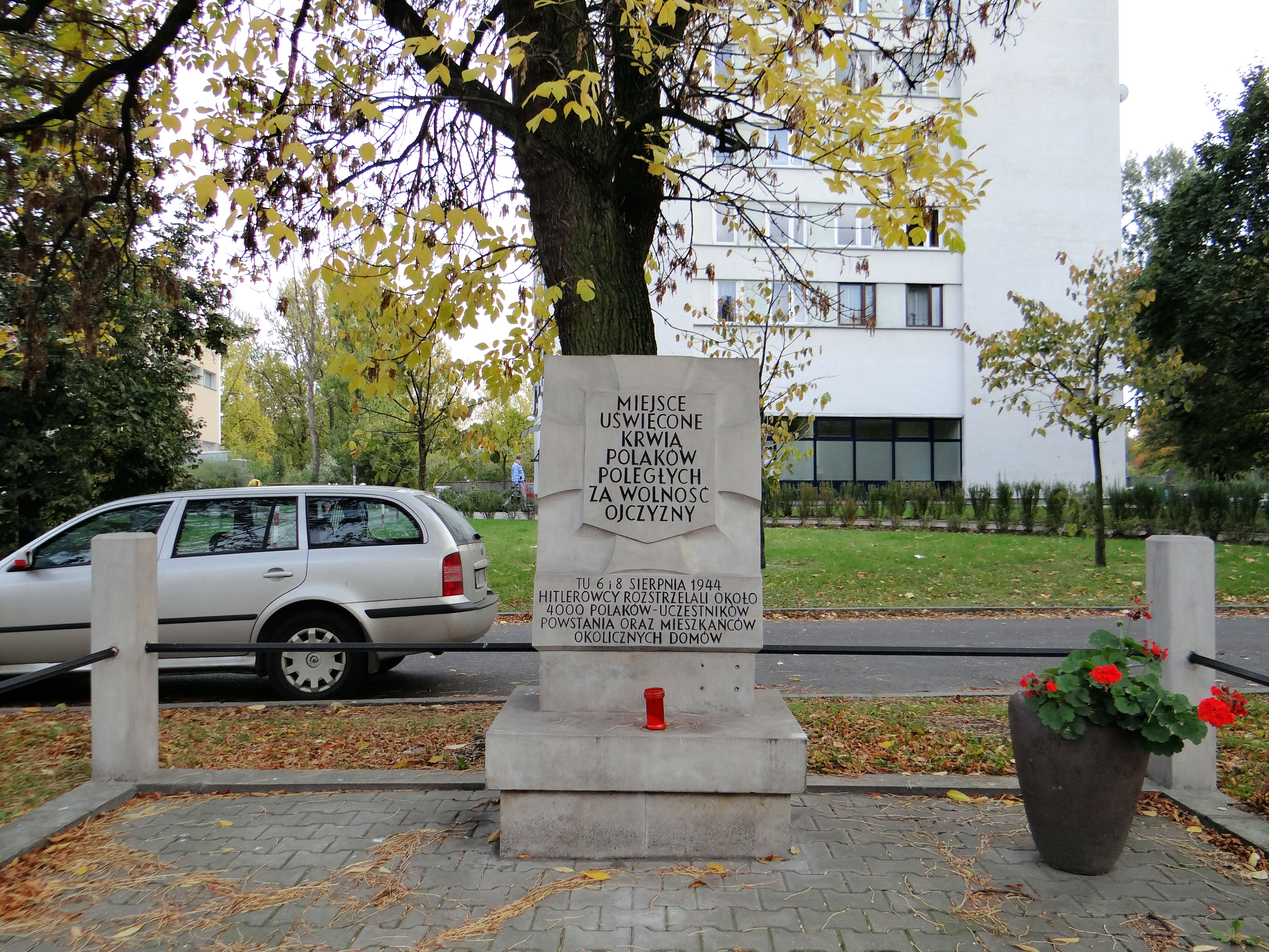 Miejsce pamięci przy ul Wolskiej 77 na Woli